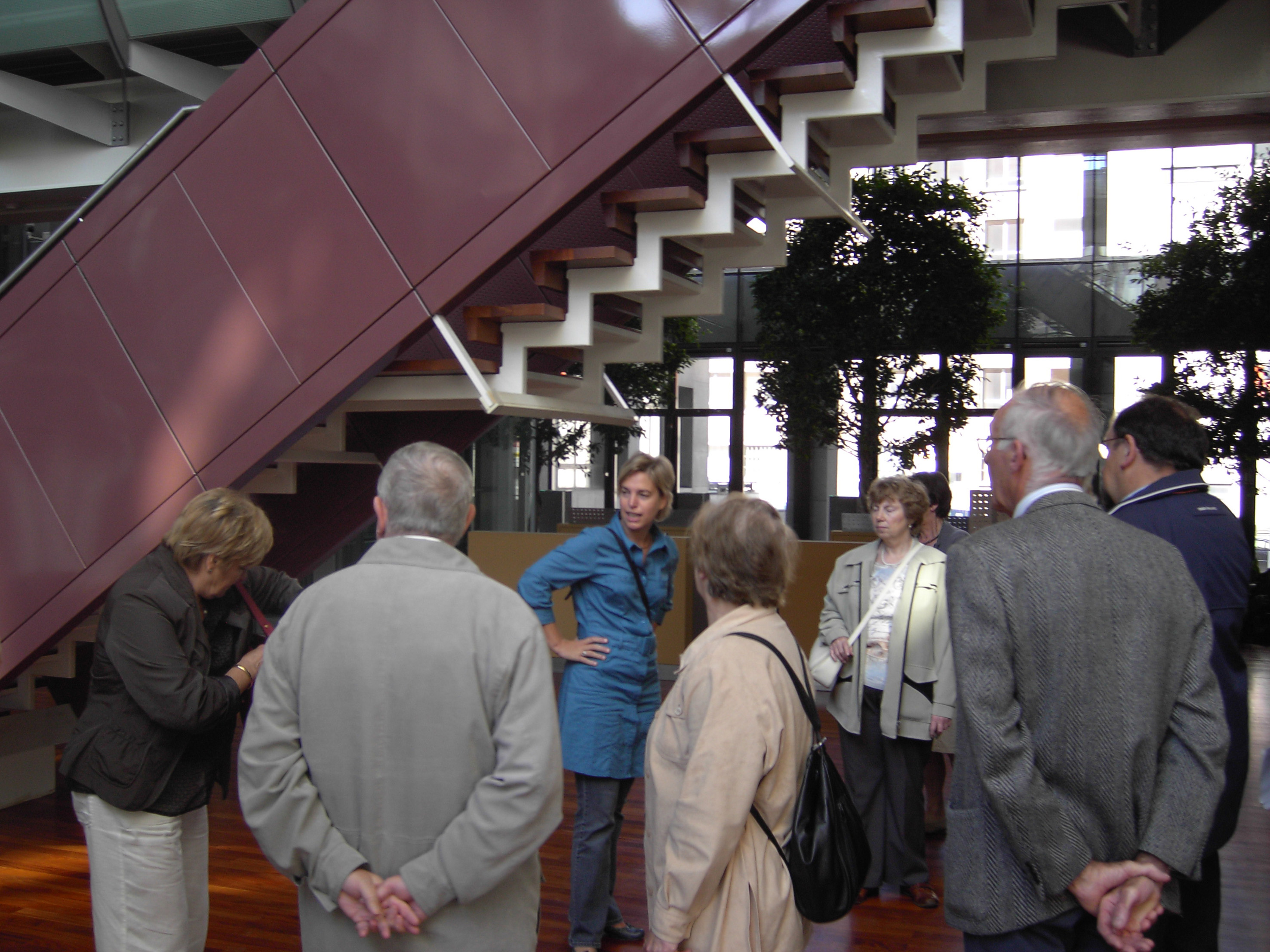 Vlaams Parlement in België - Joke Schauvliege